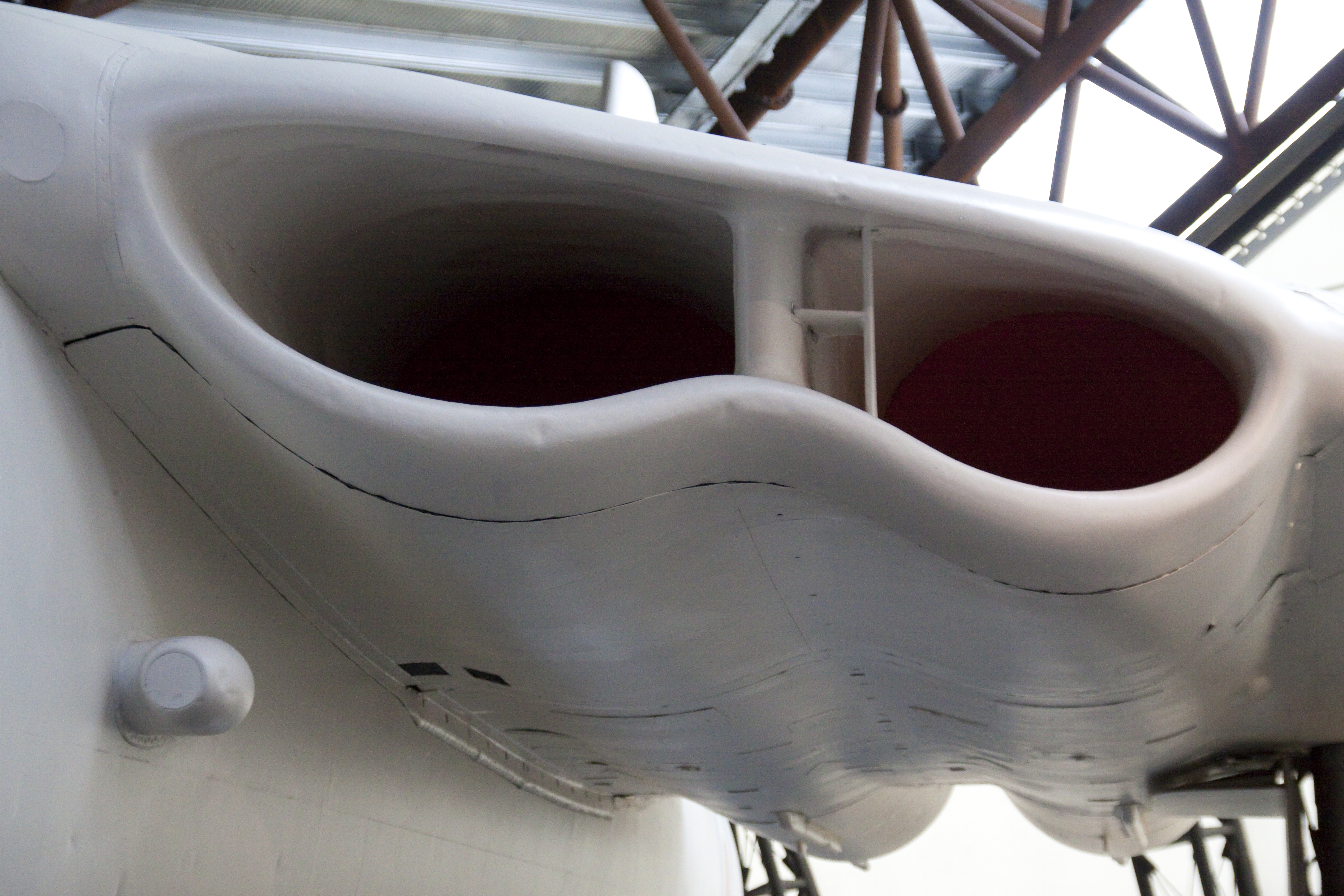 Valiant 2